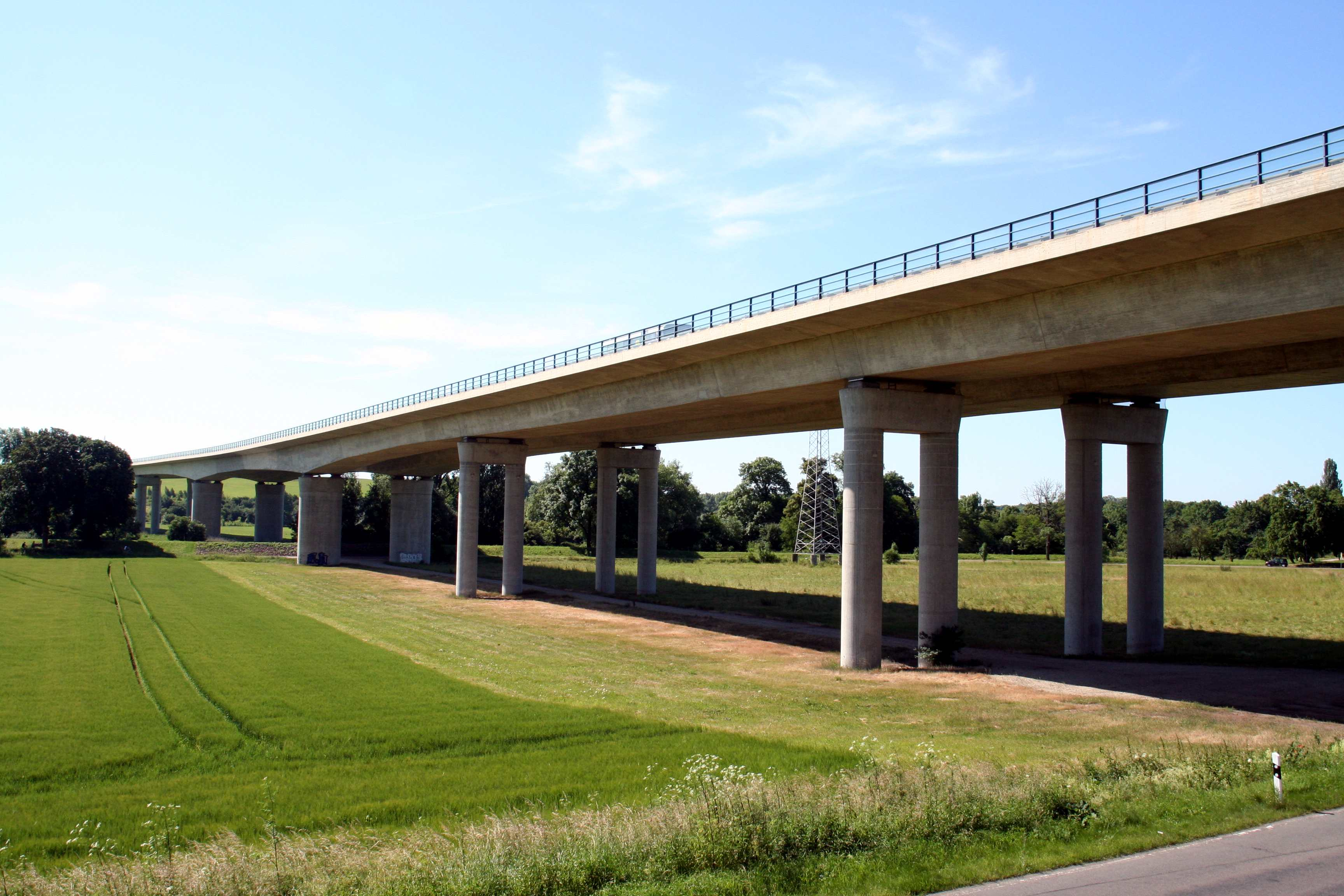 Saalebrücke der A38 bei Schkortleben in Sachsen-Anhalt